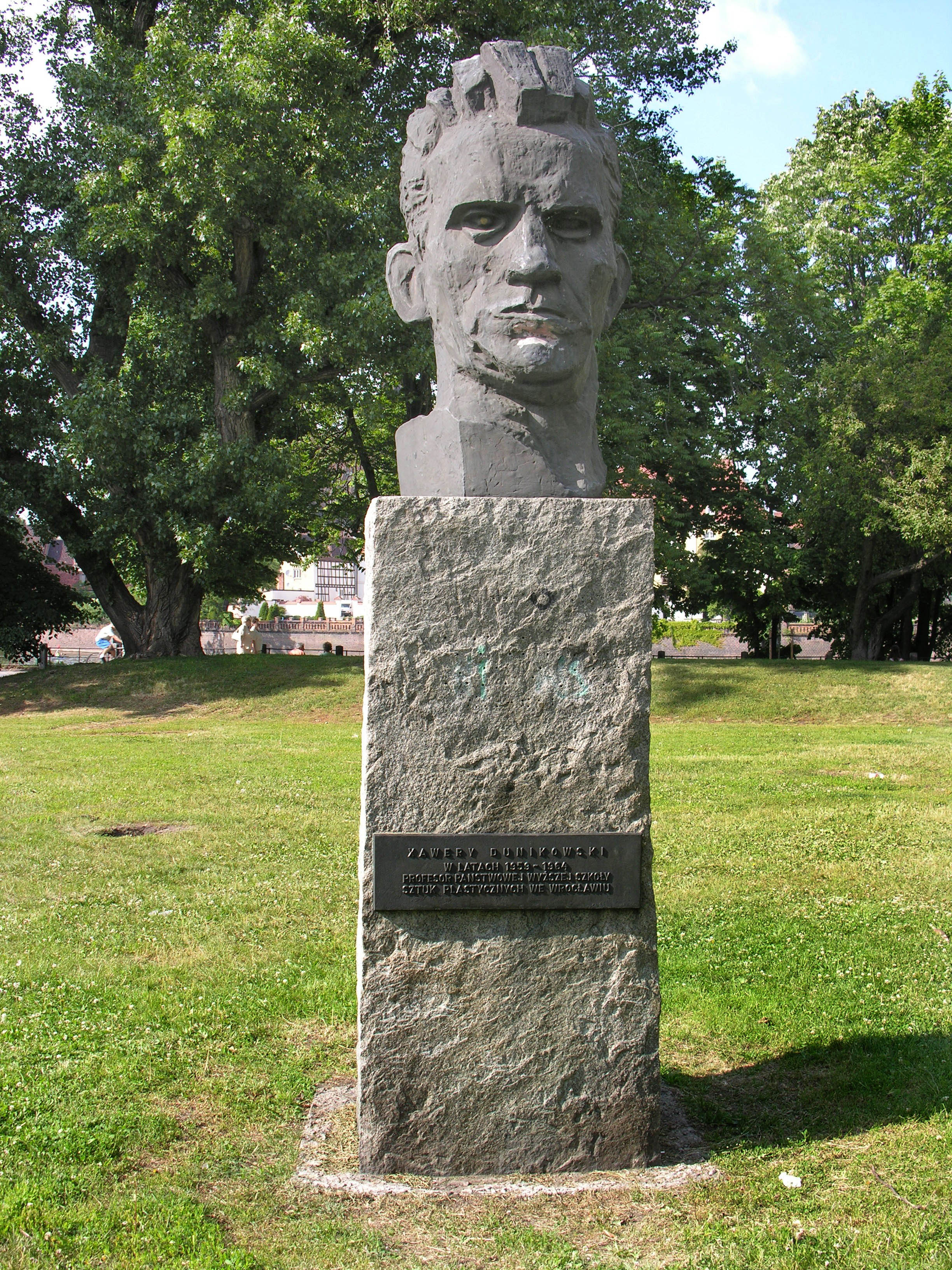 Xavery Dunikowski, Głowa robotnika. Pomnik przed Wyższą Szkołą Sztuk Plastycznych we Wrocławiu